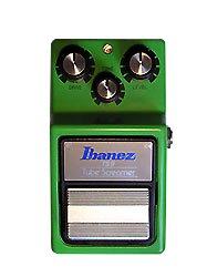 Ibanez Ts9 stompbox